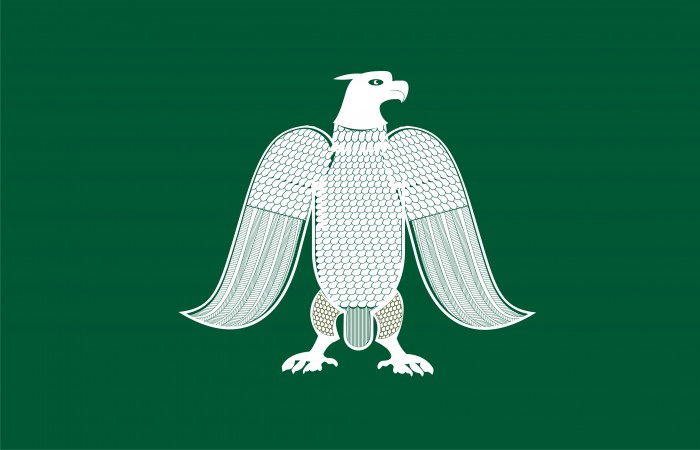 Estandarte real de Abbderraman III usada como bandera durante su mandato y la Taifa de Córdoba